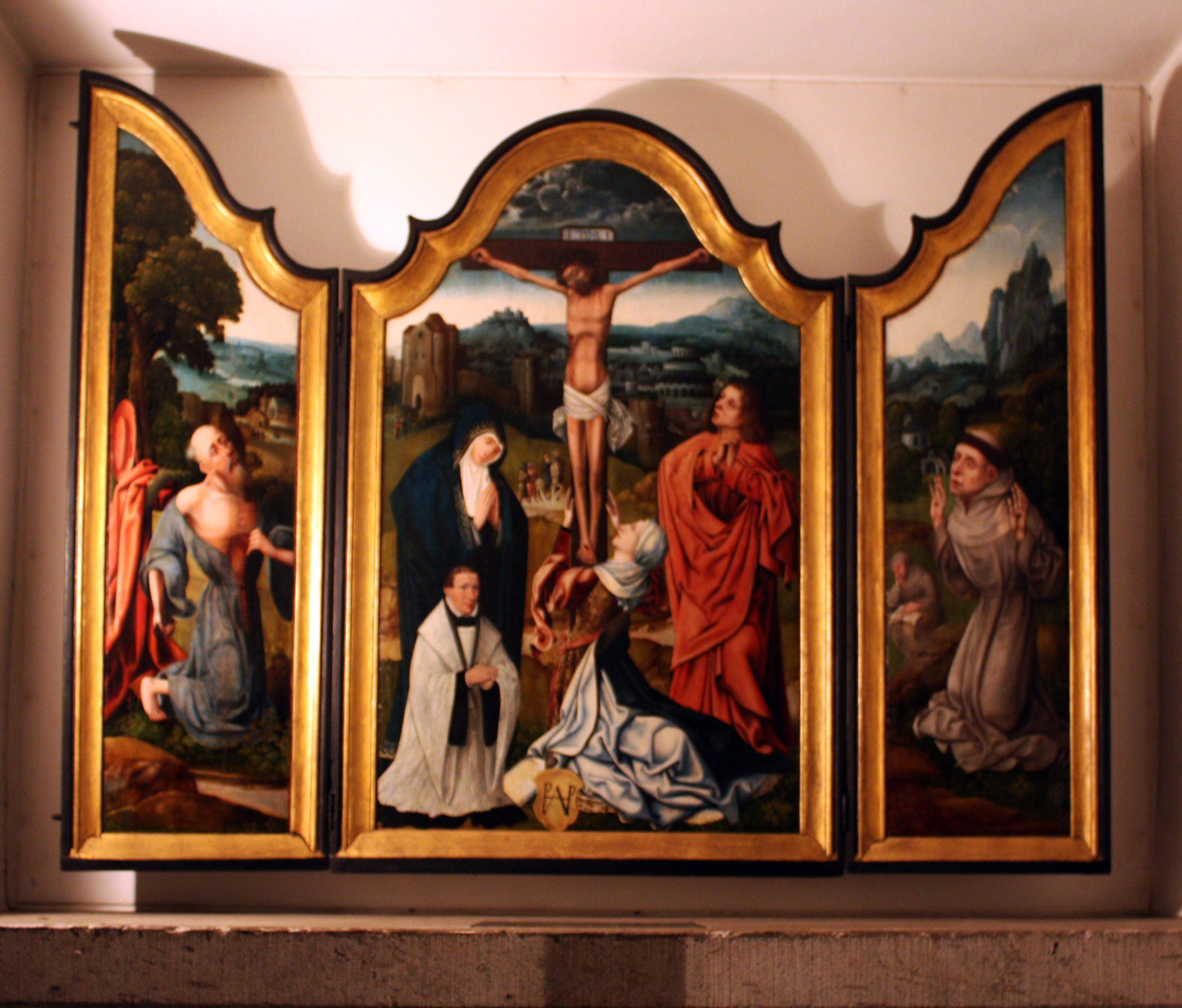 Triptychon aus der 1803 geschlossenen Pfarrkirche St. Paul. Darstellung einer Kreuzigungsgruppe vor der Landschaft von Jerusalem. Vor der hl. Maria knieend der Stifter; links der hl. Hieronymus; rechts der hl. Franziskus. Das Triptychon aus Holz, Mittelbiild 118 x85cm, gehörte zur Ausstattung der ehemaligen Pfarrkirche St. Paul in der Innenstadt